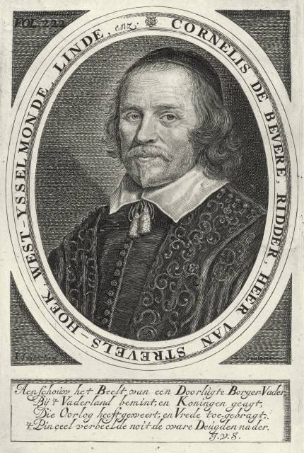 Cornelis de Bevere (ook Cornelis van Beveren) (1591-1663), heer van De kleine Lindt, Strevelshoek, Develstein en West-Ysselmonde, ridder in de Orde van St. Michiel, Dorts regent en burgemeester, rentmeester-generaal van Zuid-Holland, gecommitteerde in het college van de Staten van Holland en West-Friesland, afgevaardigde naar de Synode van Dordrecht (1627), gecommitteerde raad van Holland, in de Staten-Generaal, buitengewoon ambassadeur aan de hoven van Denemarken en Noorwegen en de stad Hamburg en aan het hof van St. James